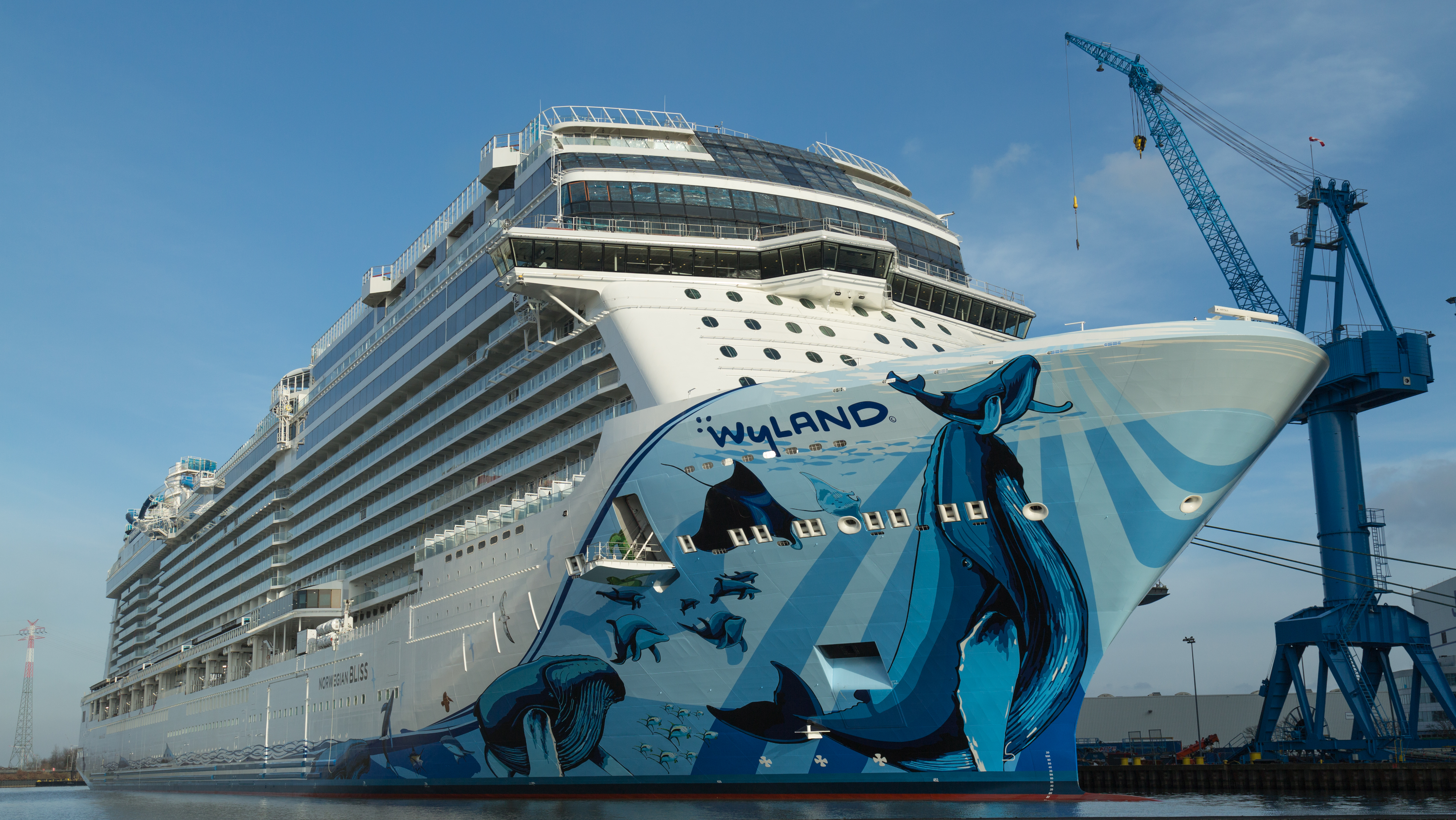 Norwegian Bliss kurz nach dem Auslaufen aus der Halle der Meyer Werft in Papenburg